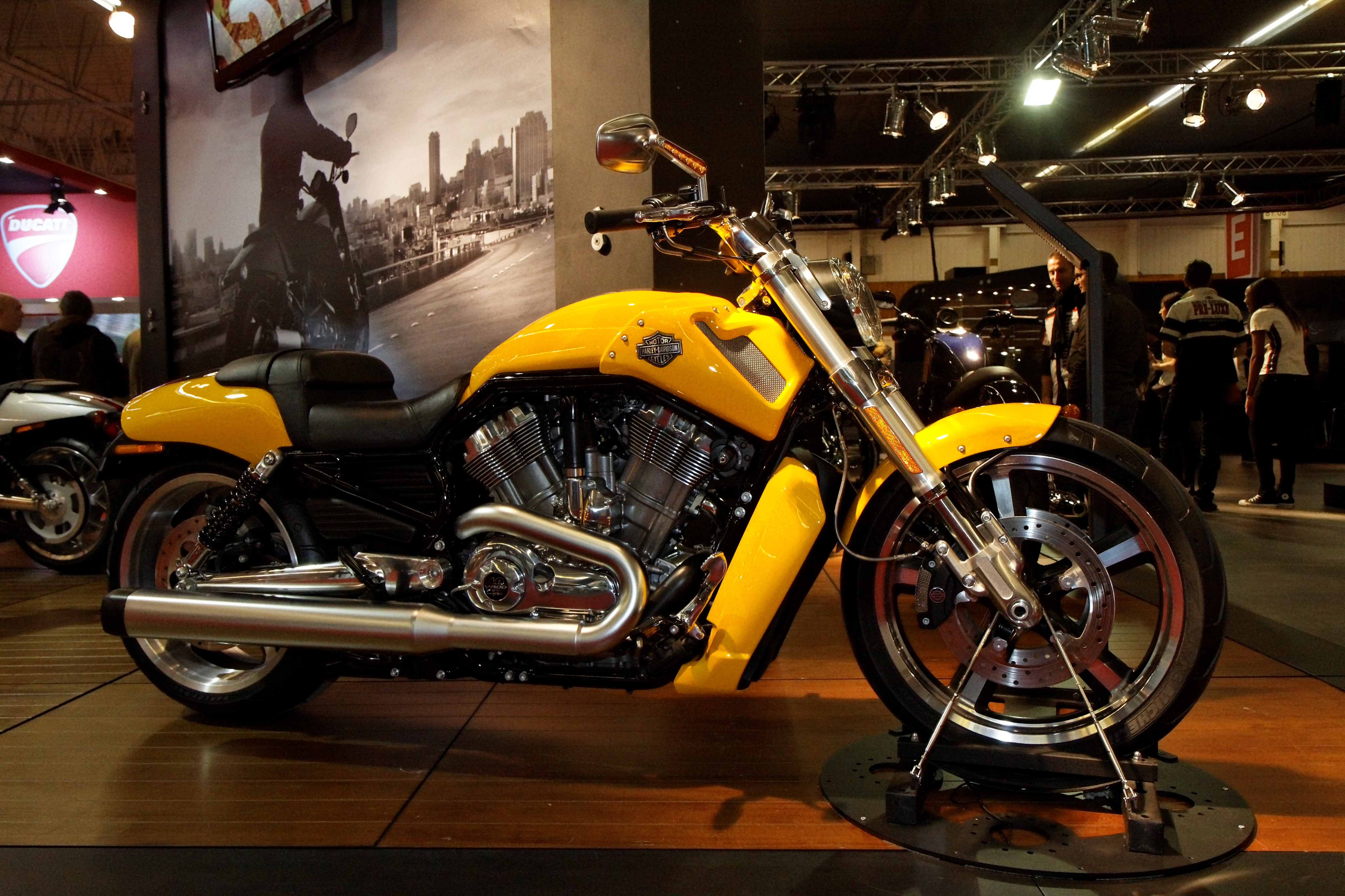 Harley-Davidson - VRSCF V-Rod Muscle